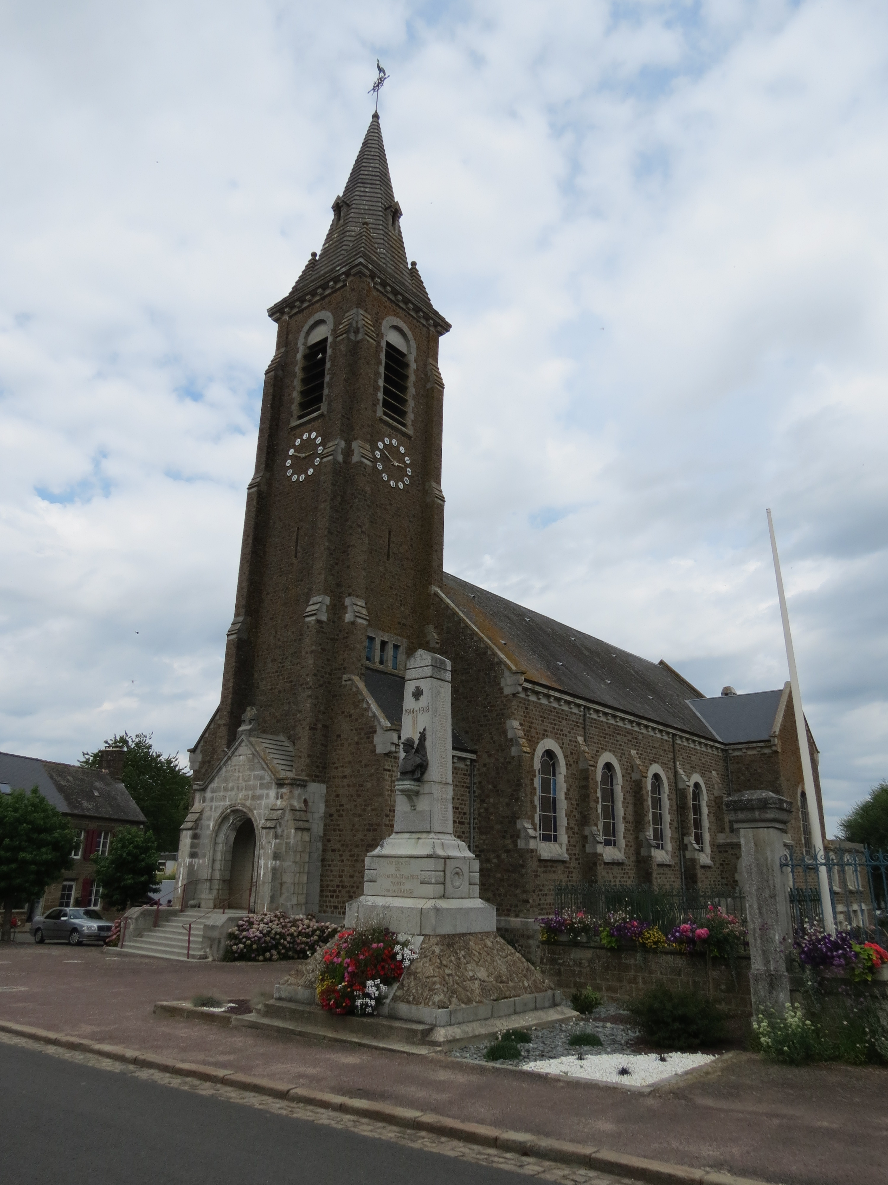 Église Saint-Fraimbault.